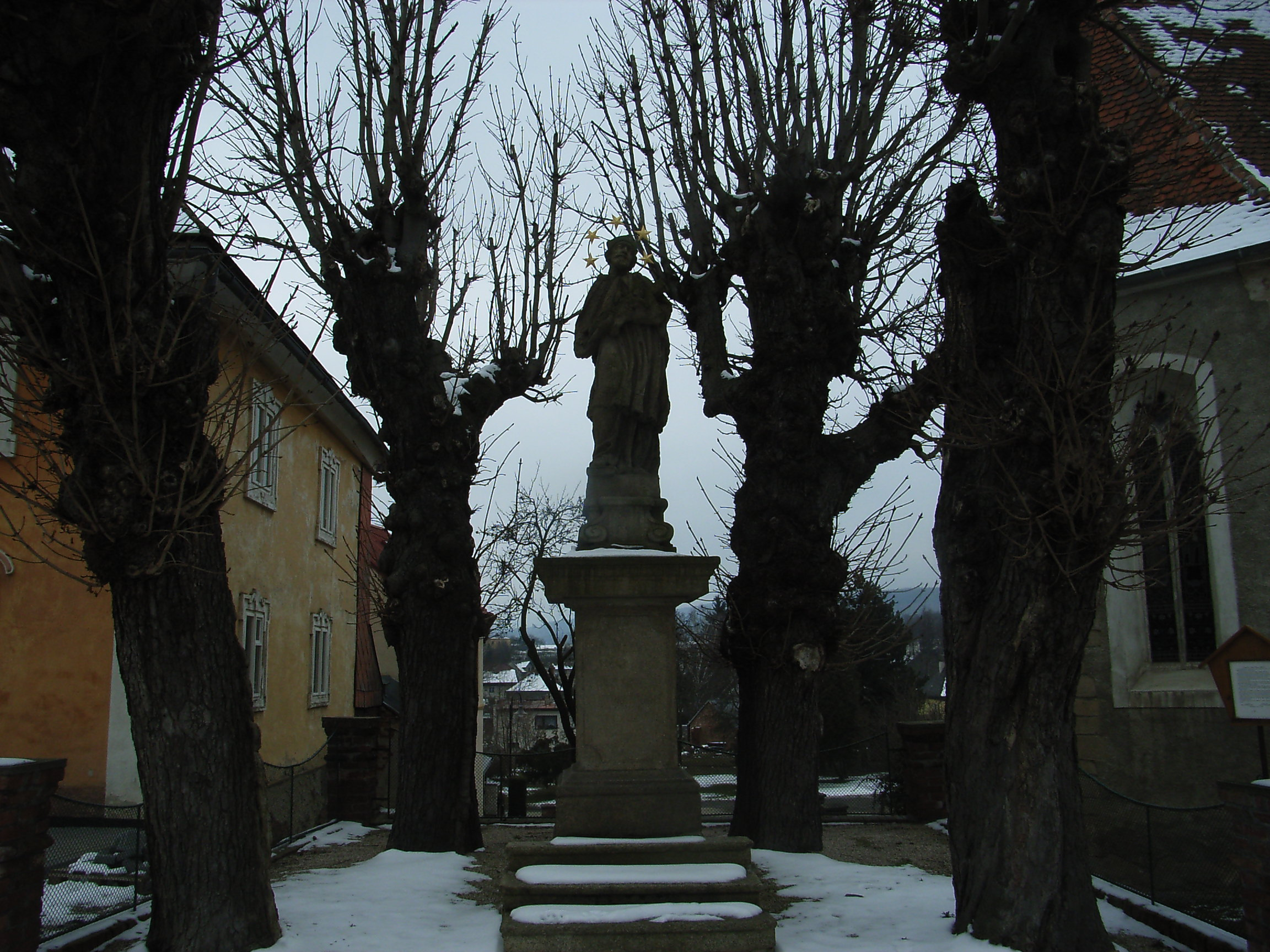 Poběžovice Nepomukstatue zwischen Pfarrhaus und Kirche (2013)